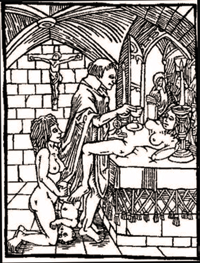 Messe noire, gravure sur bois du XVIe siècle